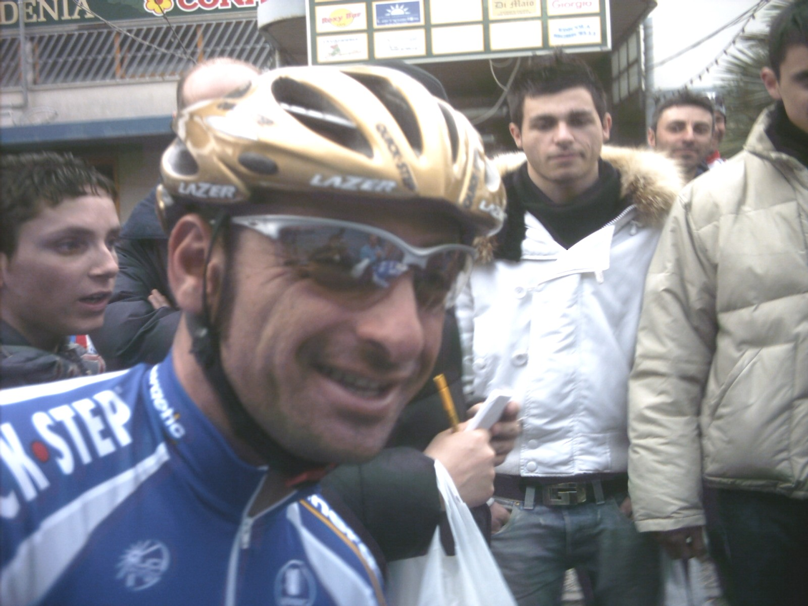 Paolo Bettini nella cronosquadre Misano-Misano